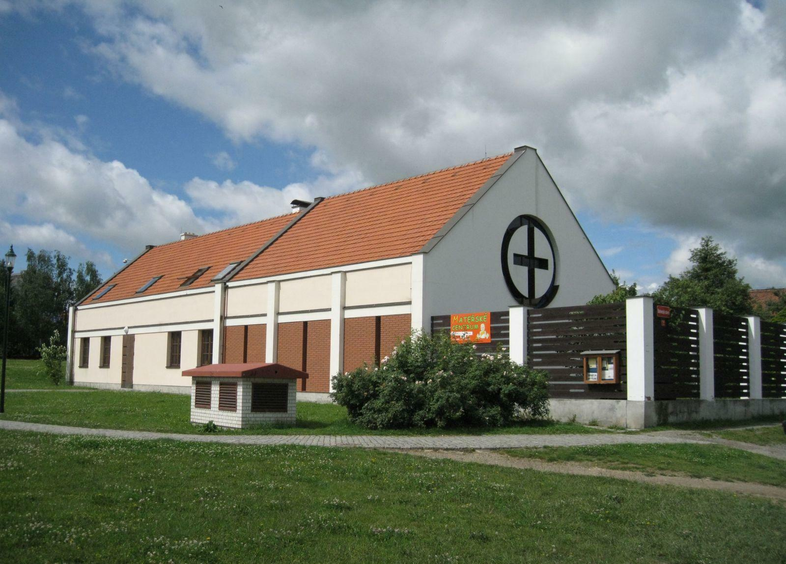 Modlitebna Sboru ECM v Plzni-Lochotíně